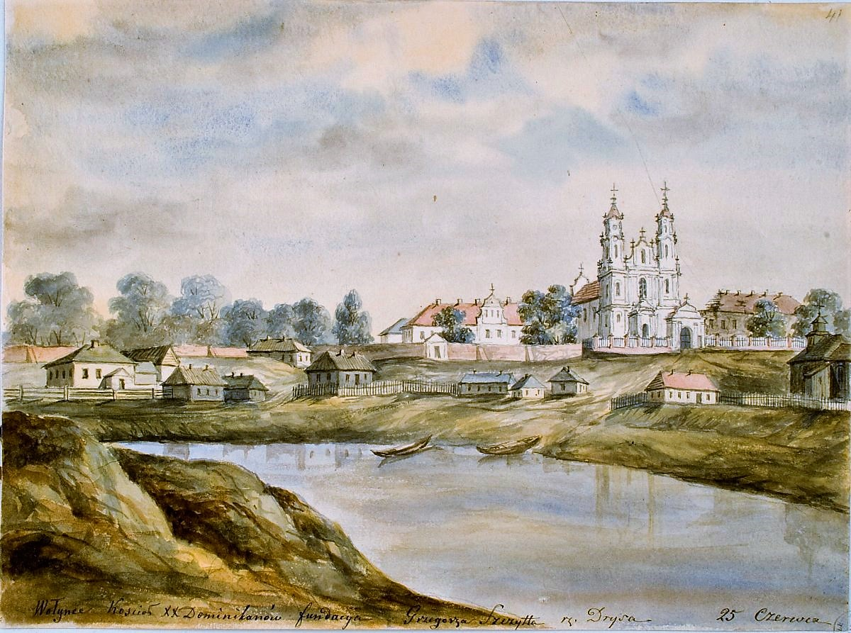 Беларуская (тарашкевіца): Валынцы (Vałyncy). Касьцёл і кляштар дамініканаў. Акварэль Напалеона Орды